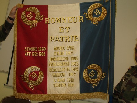 drapeau du 51 R.I